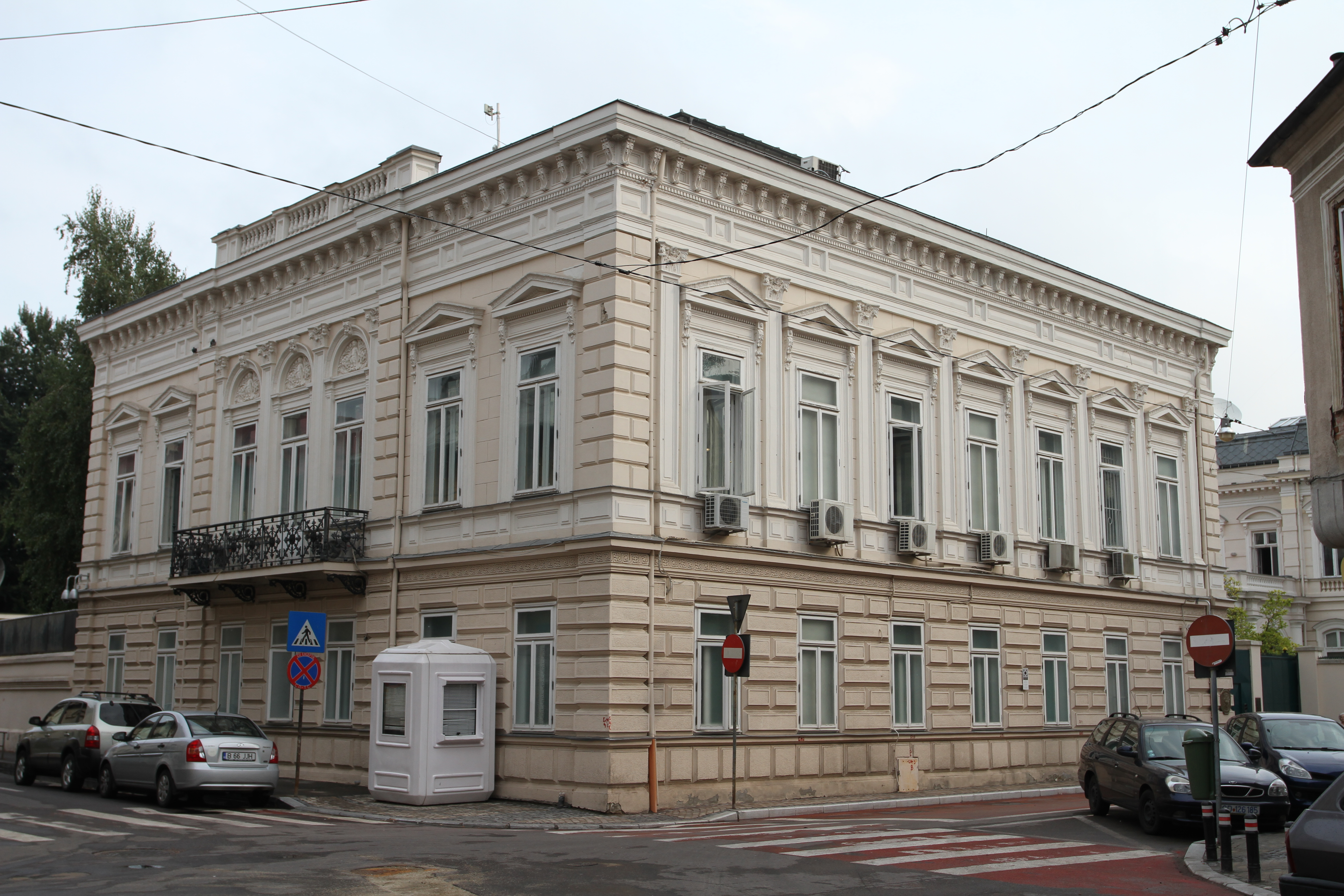 Ambasada Republicii Franceze. Fostele case ale lui Iancu Marghiloman, tatăl marelui om politic liberal Alexandru Marghiloman. Casele au fost ridicate după planurile arhitectului Carol Beniș și extinse în 1889, găzduiesc ambasada Franței incepând cu anul 1935.